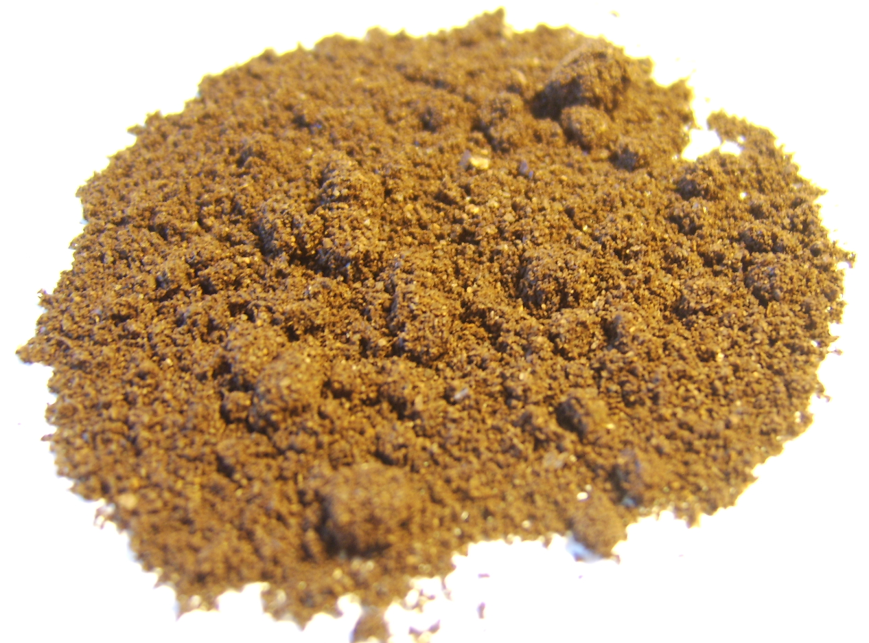 Fine espresso beans.